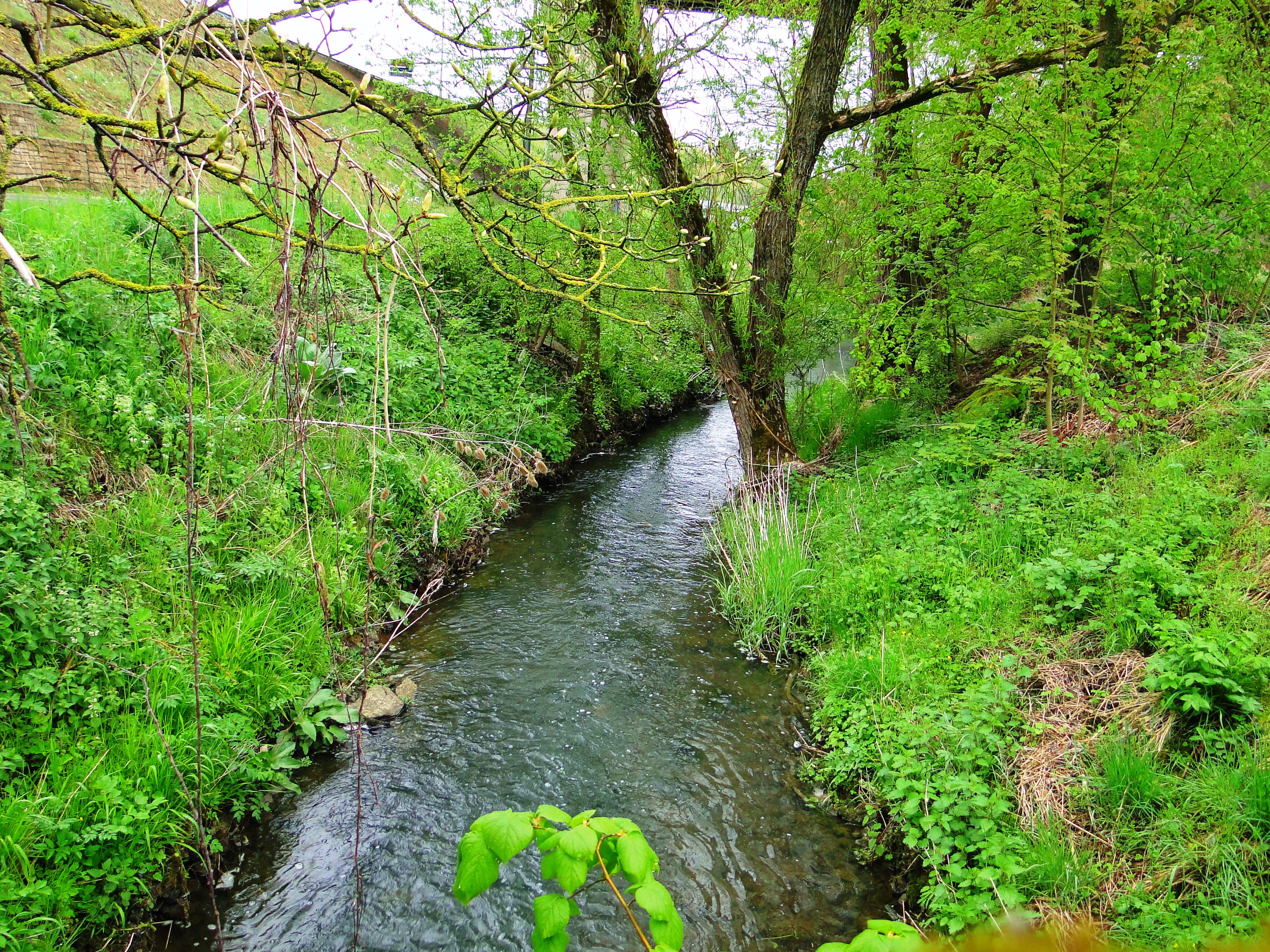 D'Péitruss op der Helfenterbréck